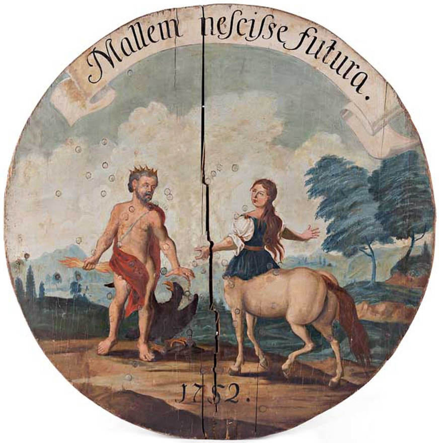 Schützenscheibe von 1752. "Mallem nescisse futura" (Ovid, Metamorphosen, 2,600; "Ich wollte, ich hätte die Zukunft nicht gewusst."). Motiv: Begegnung zwischen Zeus dem Kentaurmädchen Okyroe (Tochter des Cheiron). Öl auf Holz. Ø 101 cm